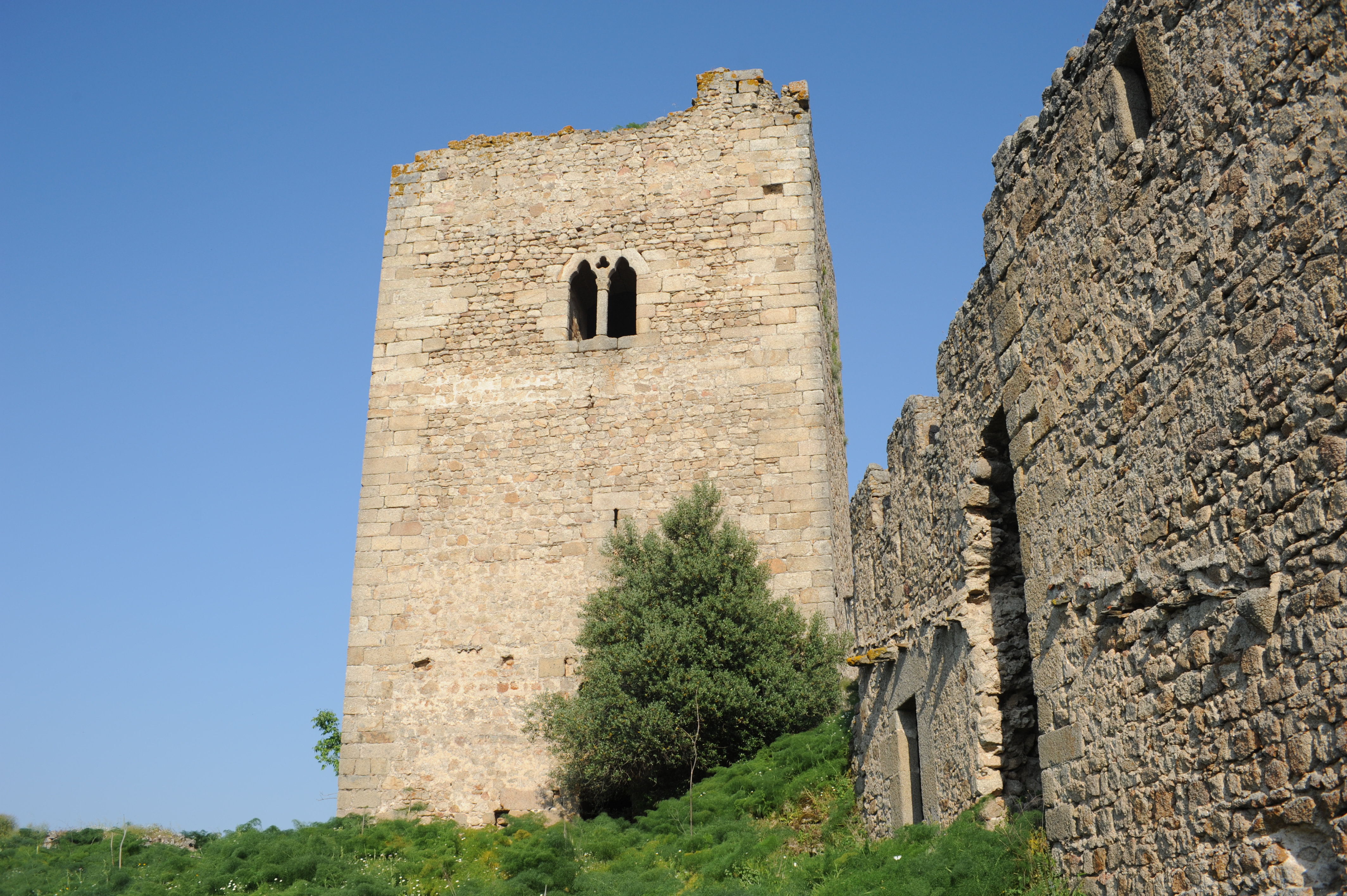 Detalle del Castillo de Peñafiel (Zarza la Mayor)